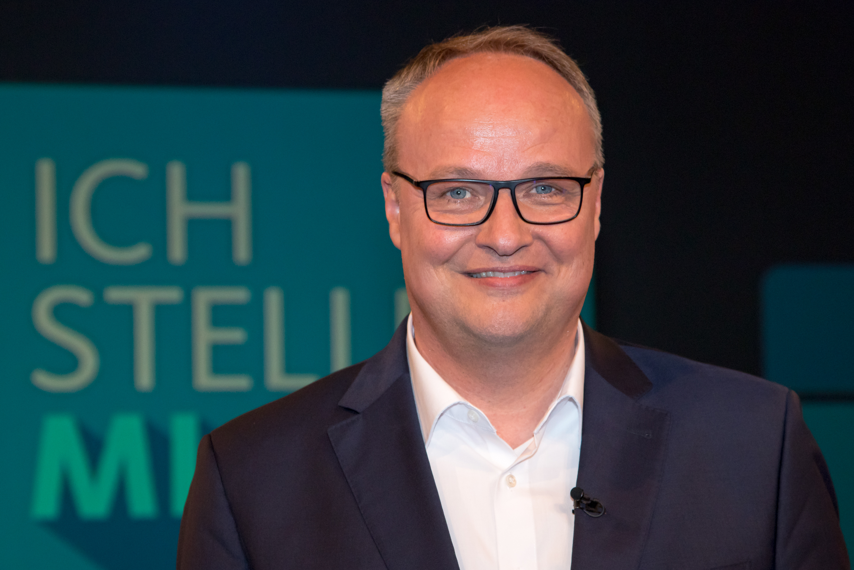 Oliver Welke in der TV-Aufzeichnung "Ich stelle mich" des WDR vom 30. Mai 2017